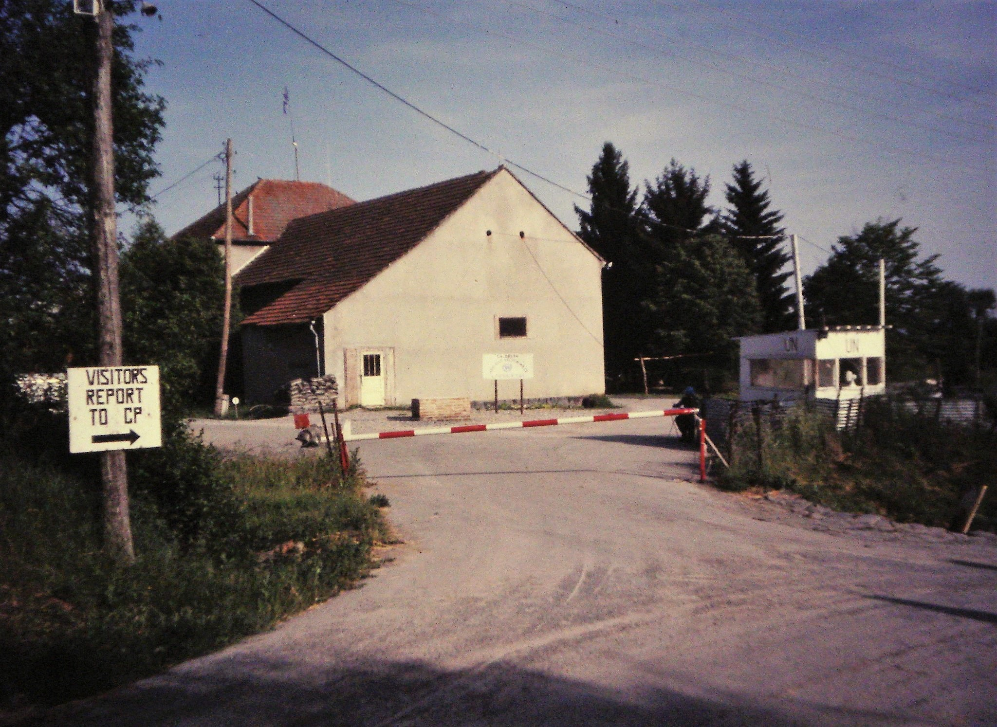 Base Batinjani de UNPROFOR. Año 1994.